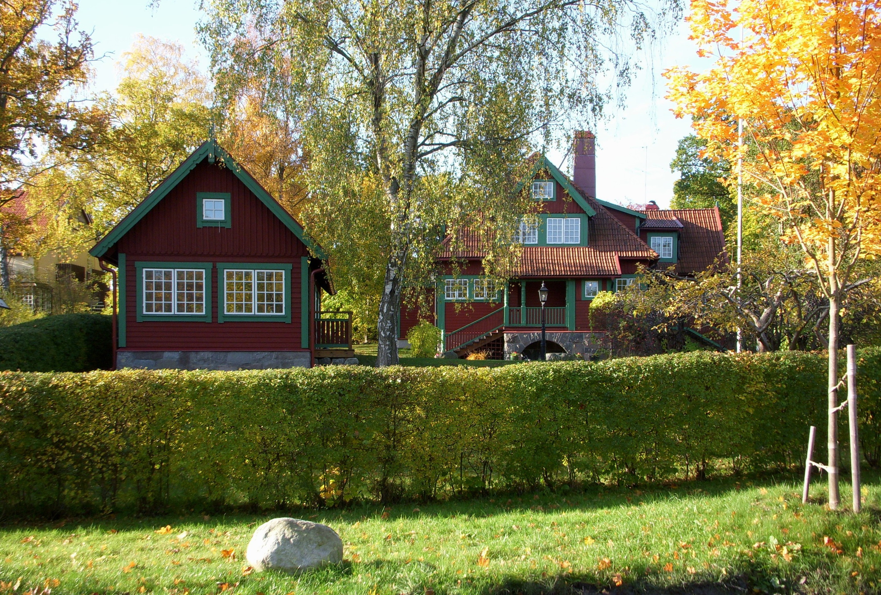 Villa Sundelin, Storängen, Ängsvägen/Storängsvägen 7, Nacka, arkitekt Karl Güettler